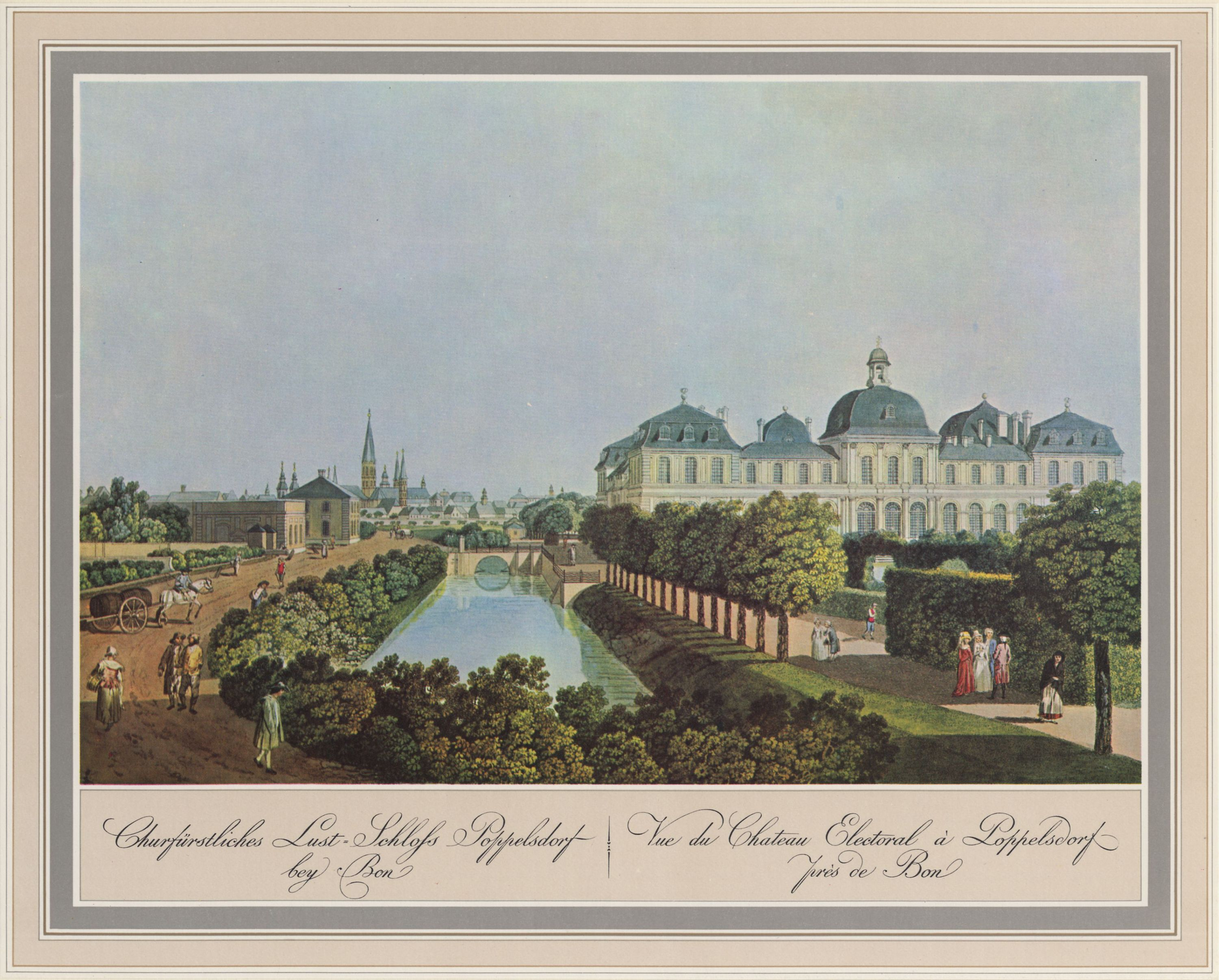 Poppelsdorfer Schloss, llustration aus: »Fünfzig malerische Ansichten Rhein-Stroms von Speyer bis Düsseldorf«, erschienen bei Artaria in Wien 1798; nach Aquarellen von Laurenz Janscha, die im Sommer 1792 entstanden